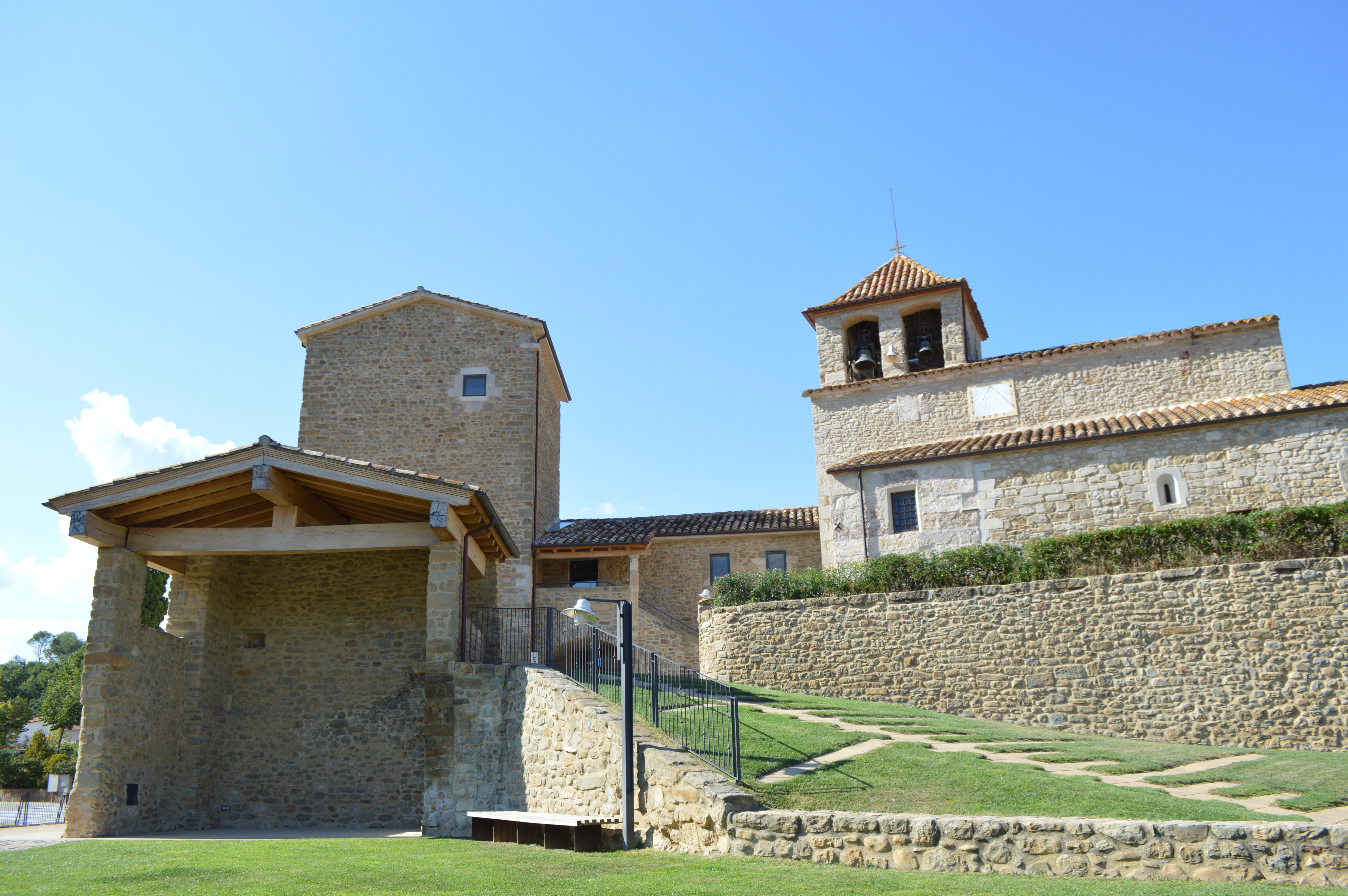 Castell de Palol de Revardit